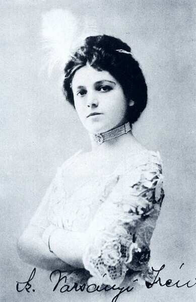 Varsányi Irén, színésznő